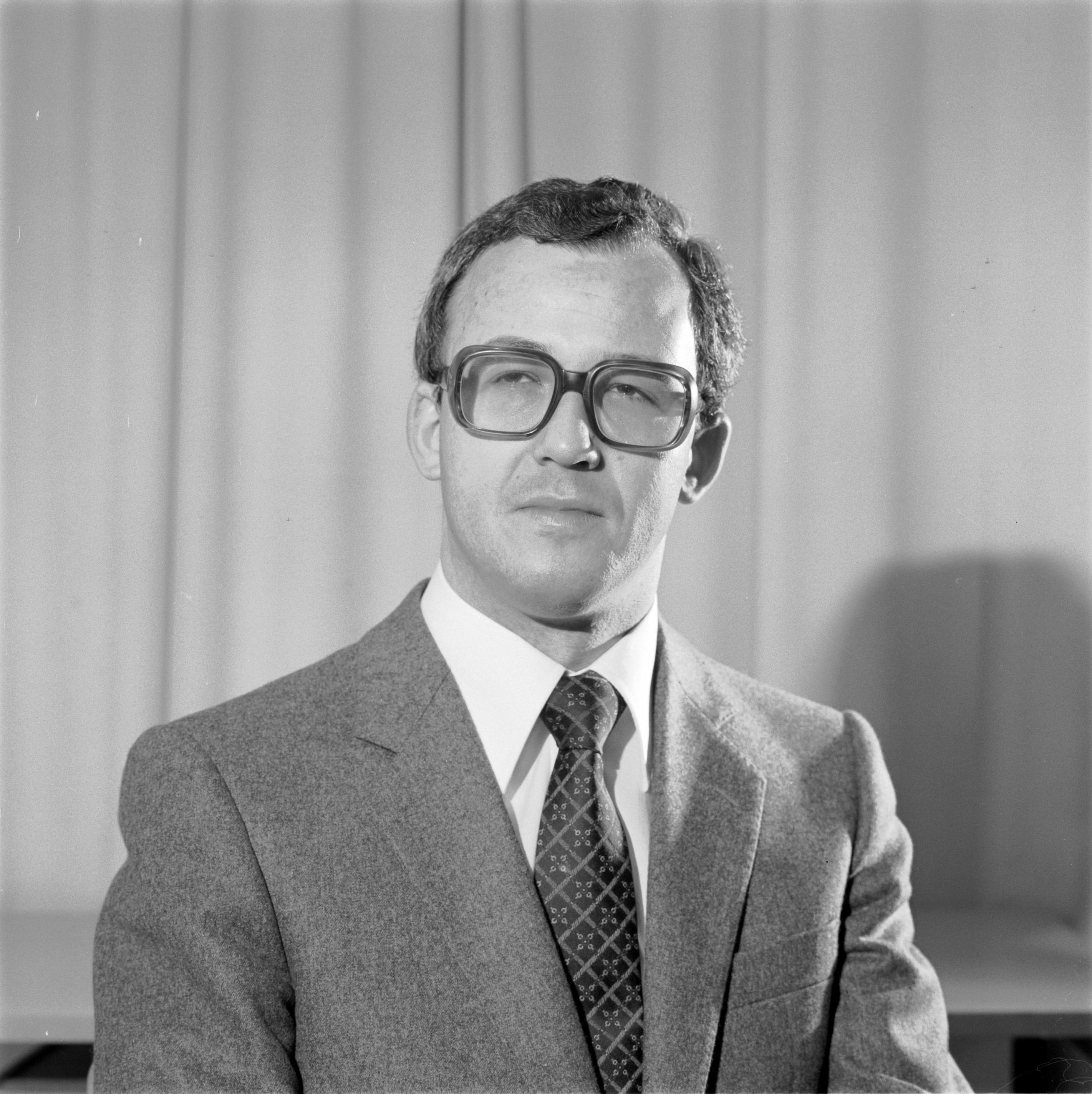 Jürgen Weiss, zu diesem Zeitpunkt junger Bundesrat und späterer Bundesminister für Föderalismus und Verwaltungsreform, im Jahr 1979.